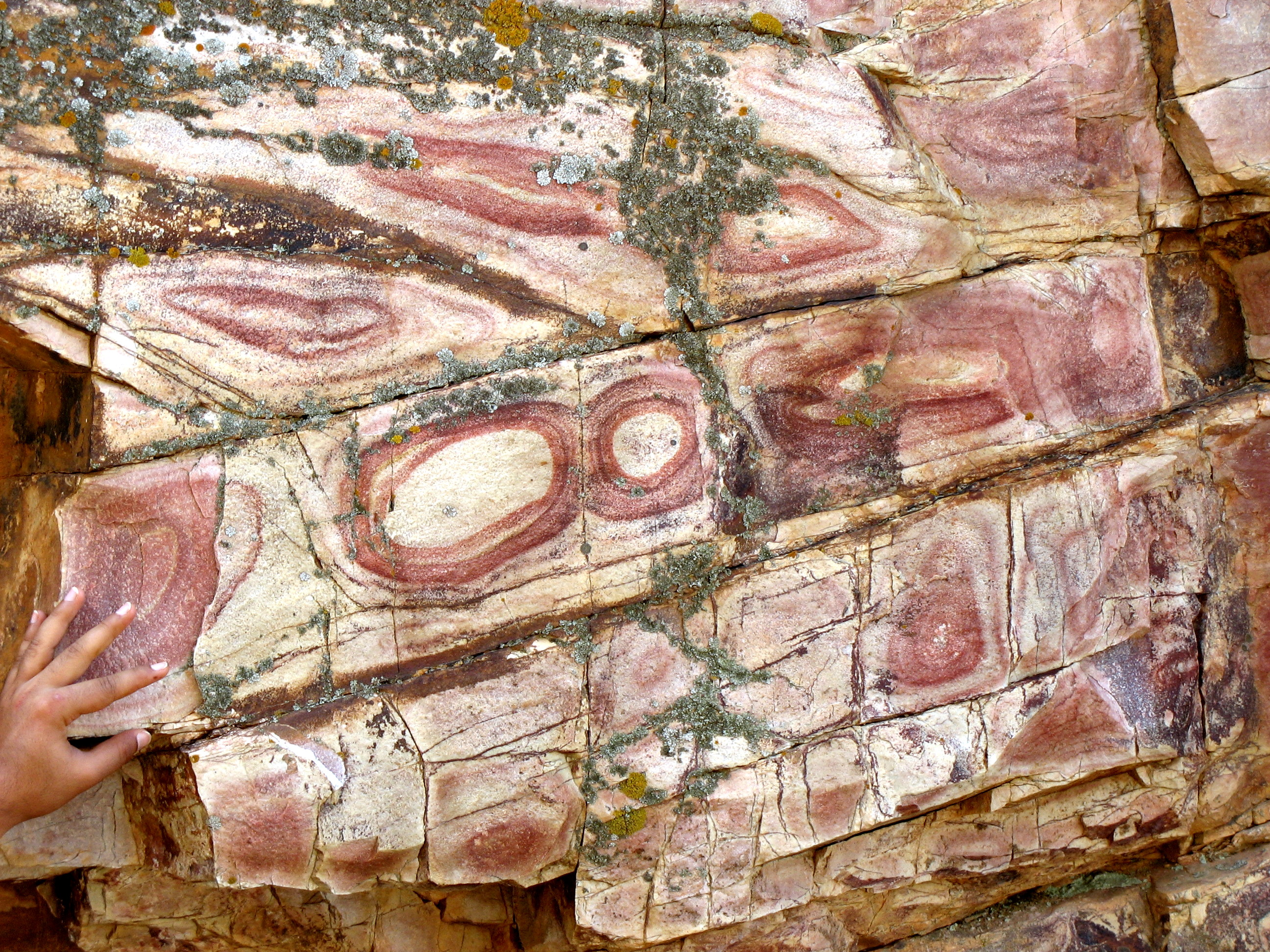 Anillos de Liesegang sobre cuarcitas. Formación La Serrona. Silúrico. Barrios de Luna (León). En este caso se manifiestan sobre la superficie de estratificación (paralela al plano de la imagen), y su desarrollo está condicionado por la distribución de las fracturas del diaclasado.